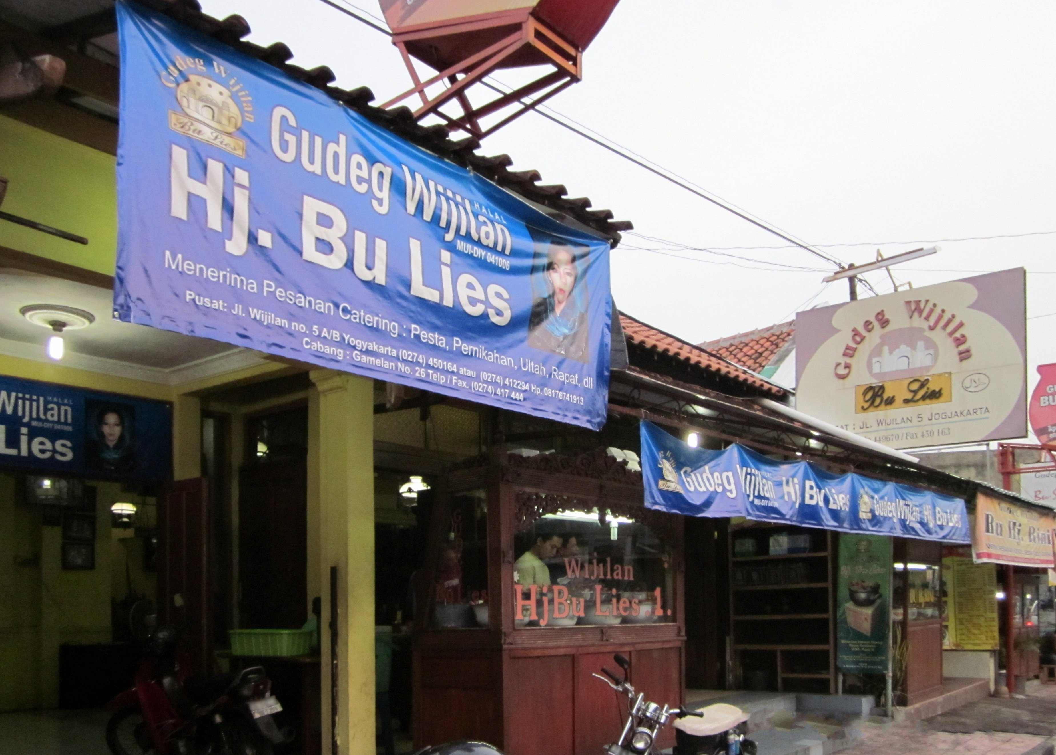 Gudeg Wijilan Hj. Bu Lies